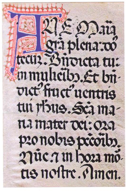 Testo della preghiera "Ave Maria" presente nel libretto di preghiere del beato Antonio da Stroncone